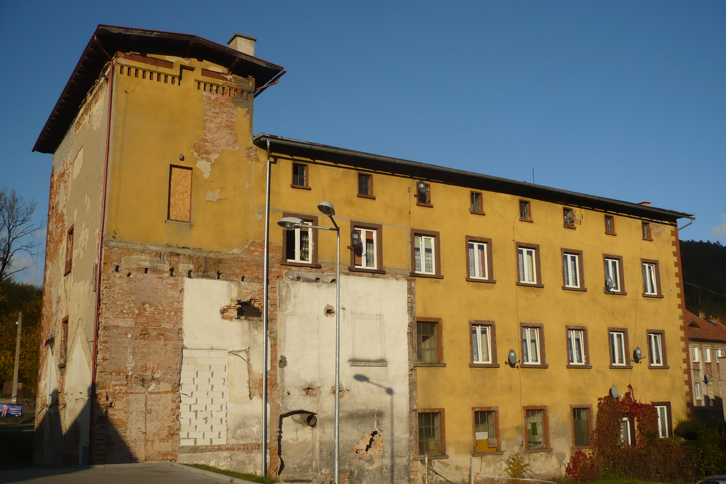 Ludwikowice Kłodzkie. Relikt przemysłowy: budynek biurowo-magazynowy, ul. Główna 19